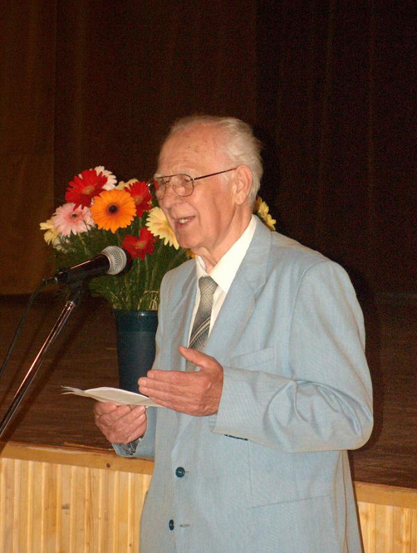 Előadás közben 2005-ben.